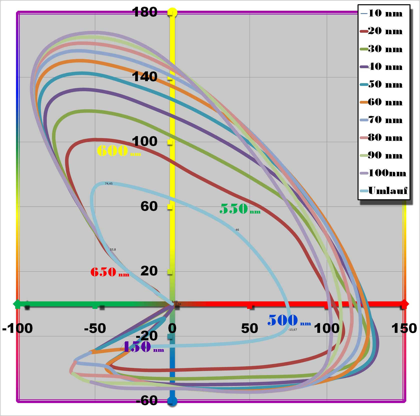 Die Farbartfläche a*/b* im CIE Lab (1976)-Farbraum: idealisiert berechnet unter Nutzung von Rechteckspektren von Optimalfarben (β(λ)=1) und Wahl der Rechteckbreite von 10 Nanometer bis 100 Nanometer. Je nach Lage und Breite der (idealisierten Spektren, real wären die Intensitäten zu schwach geworden) verändert sich die Lage der Hüllkurven. Zur besseren Übersicht ist die etwaige Lage der Wellenlängen der (vorgegebenen) Farbreize im Diagramm aufgenommen.